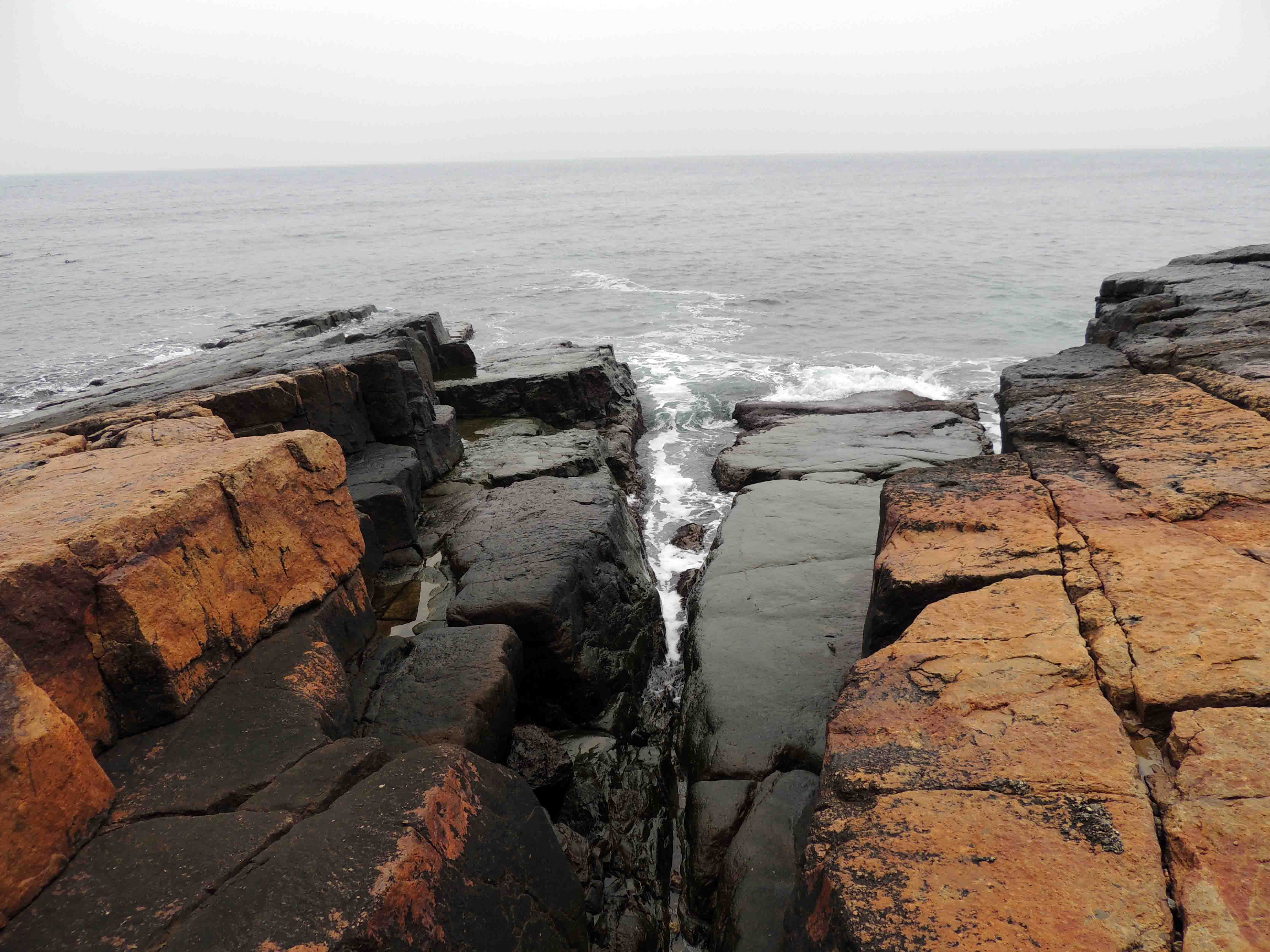 о. Зміїний